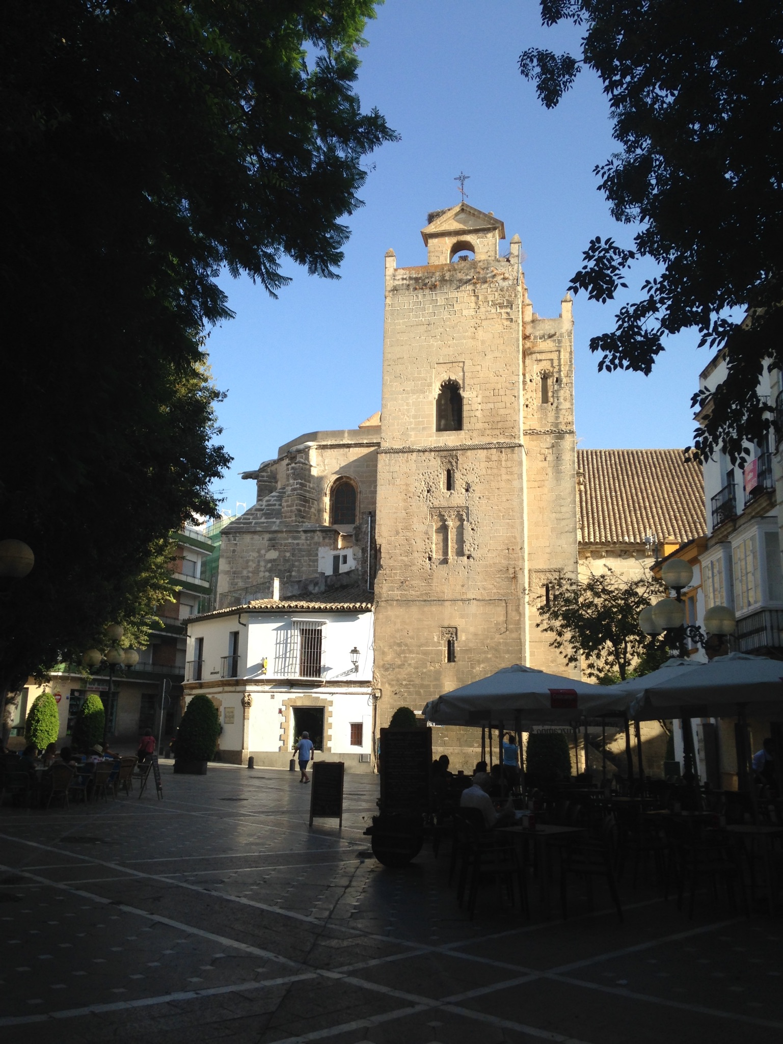 Torre de la Atalaya, del Reloj o del Cabildo